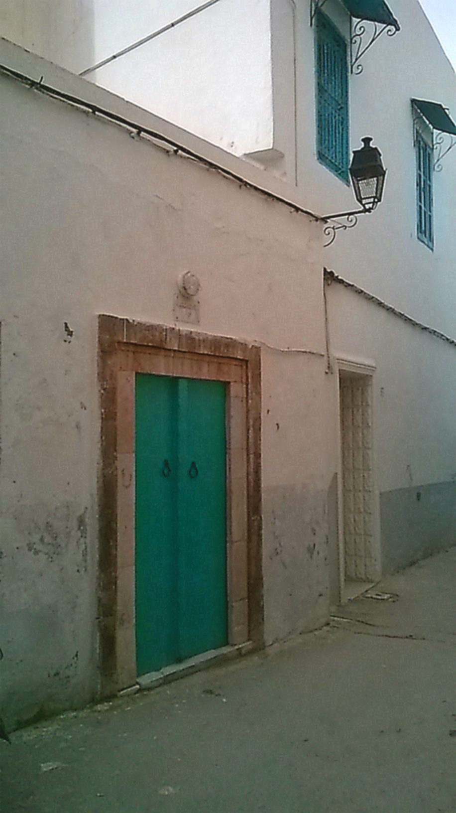 La médina de Tunis مدينة تونس العتيقة